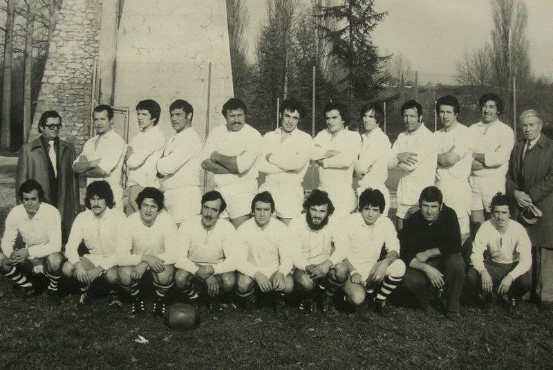 Equipe Fumel 1975